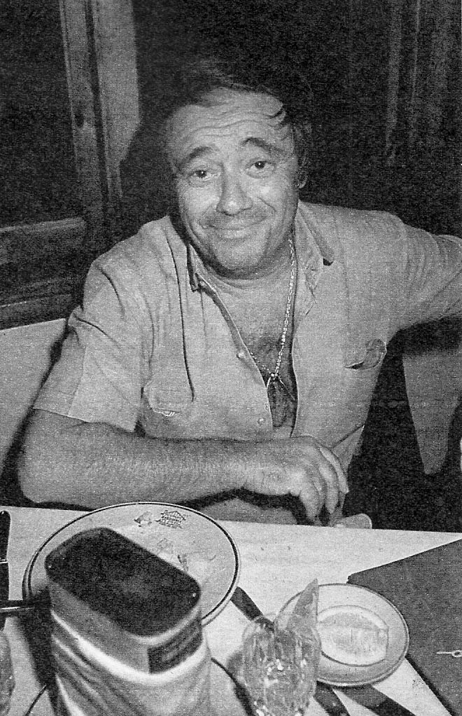 Tato Bores en Mar del Plata, 1983